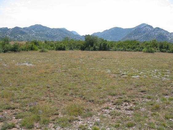 Polje von Dragalj als südliche Fortsetzung des Grahovo polje. Fluvioglaziale Ablagerungen bestimmen den Poljeboden. Schotter wird hier an mehreren Stellen abgebaut.